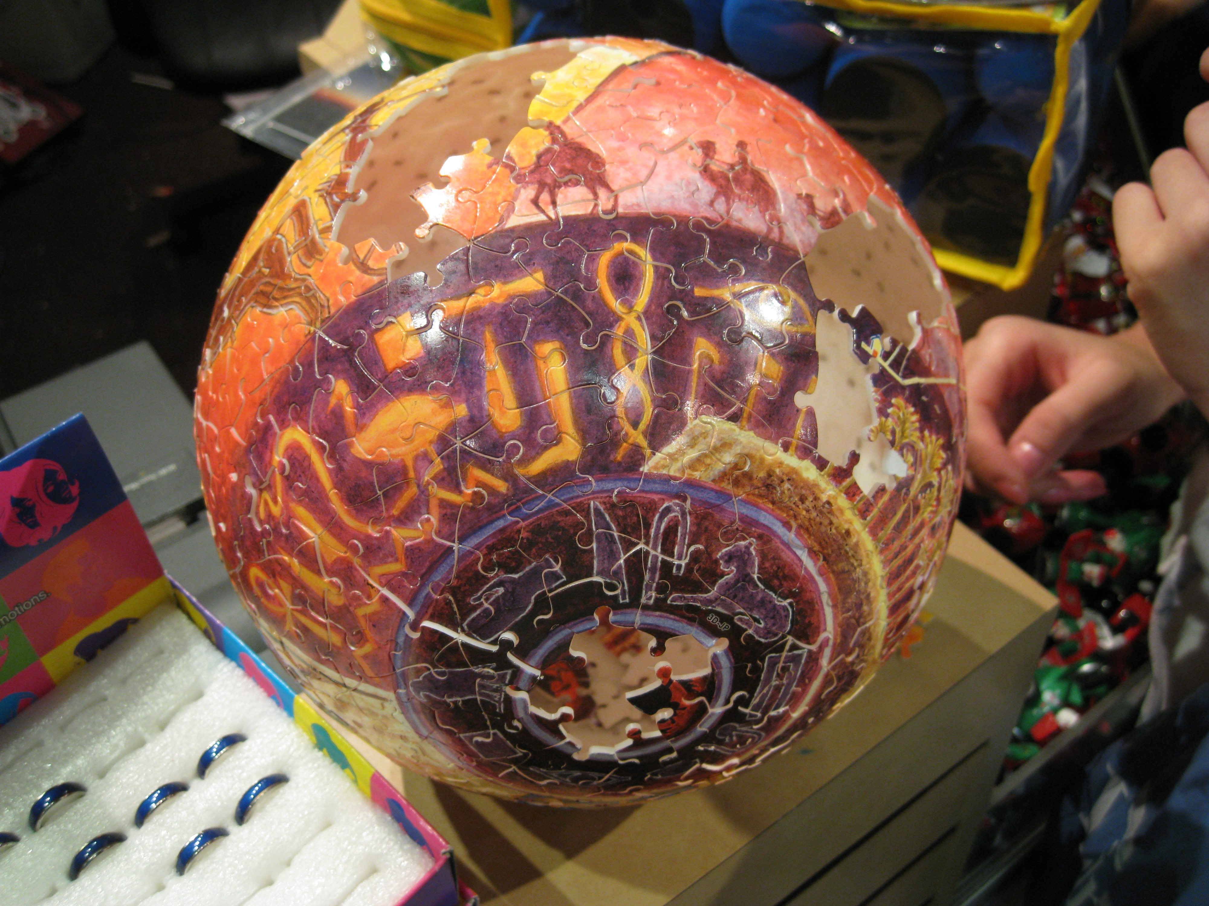 3D Jigsaw puzzle